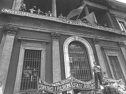 Movimento studentesco Occupazione universitaria statale Milano 1969 fotografia copiata da